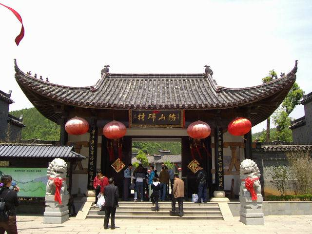 南京明文化村 入口 2004年5月4日撮影 撮影者:権作 参照：